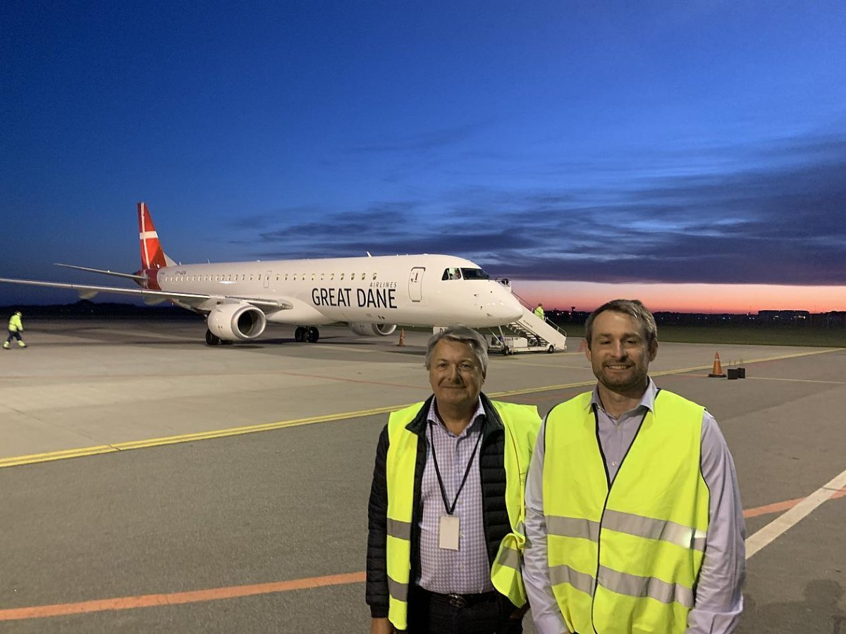 Direktøren Thomas Hugo Møller foran flyet